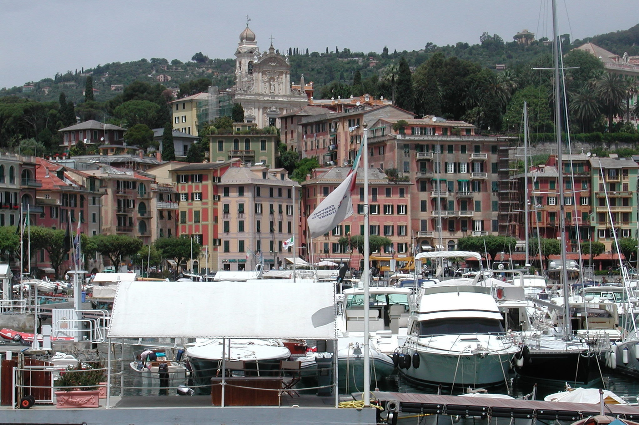 Santa Margherita Ligure, Liguria, italy